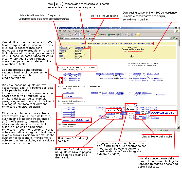 Concordanze IntraText: pagina di esempio delle concordanze del formato IntraText